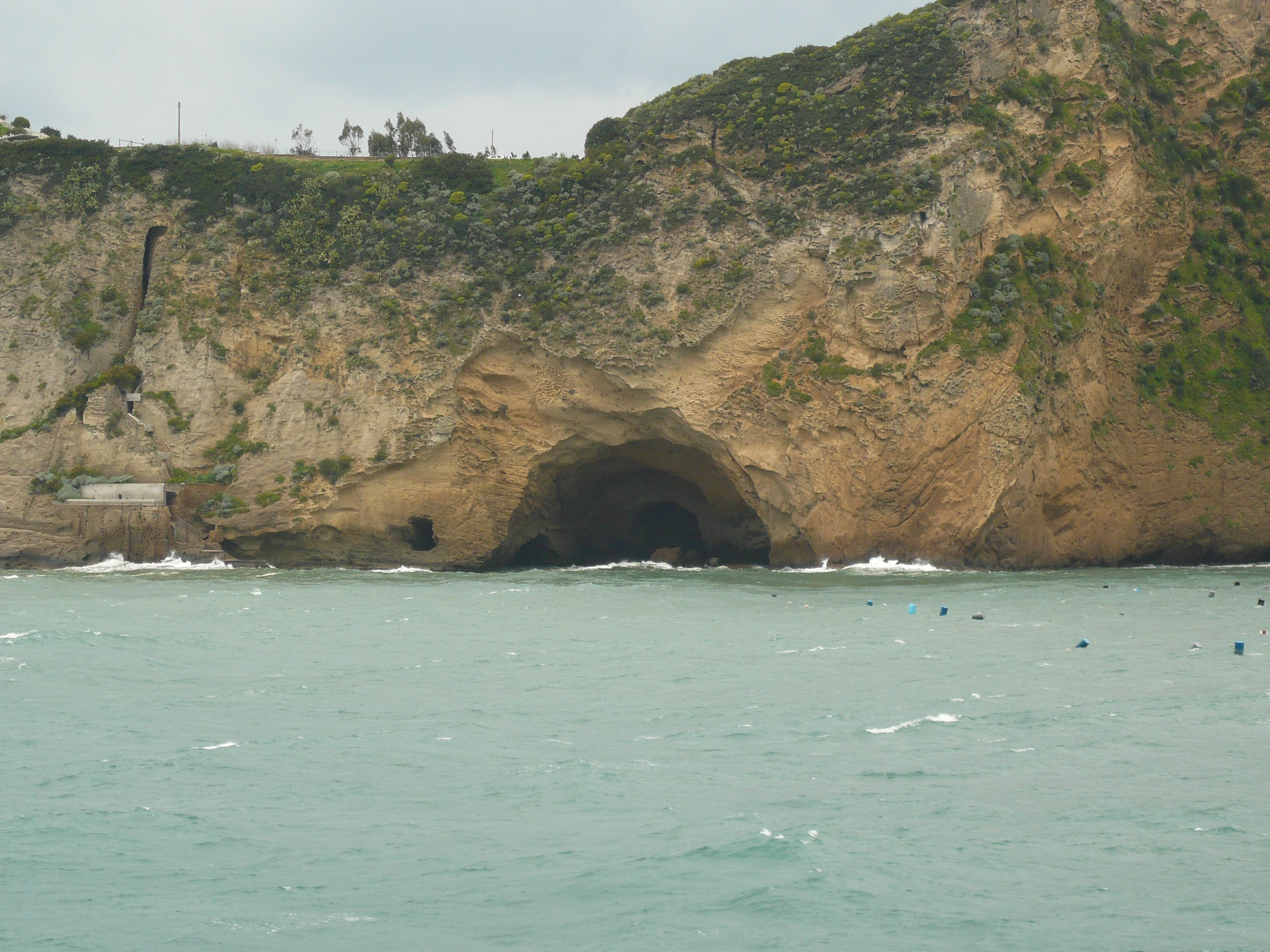 grotta-ninfeo scavata dagli antichi romani sul lato di Capo Miseno rivolto a est (verso il golfo di Pozzuoli) Autore foto: Roberto De Martino